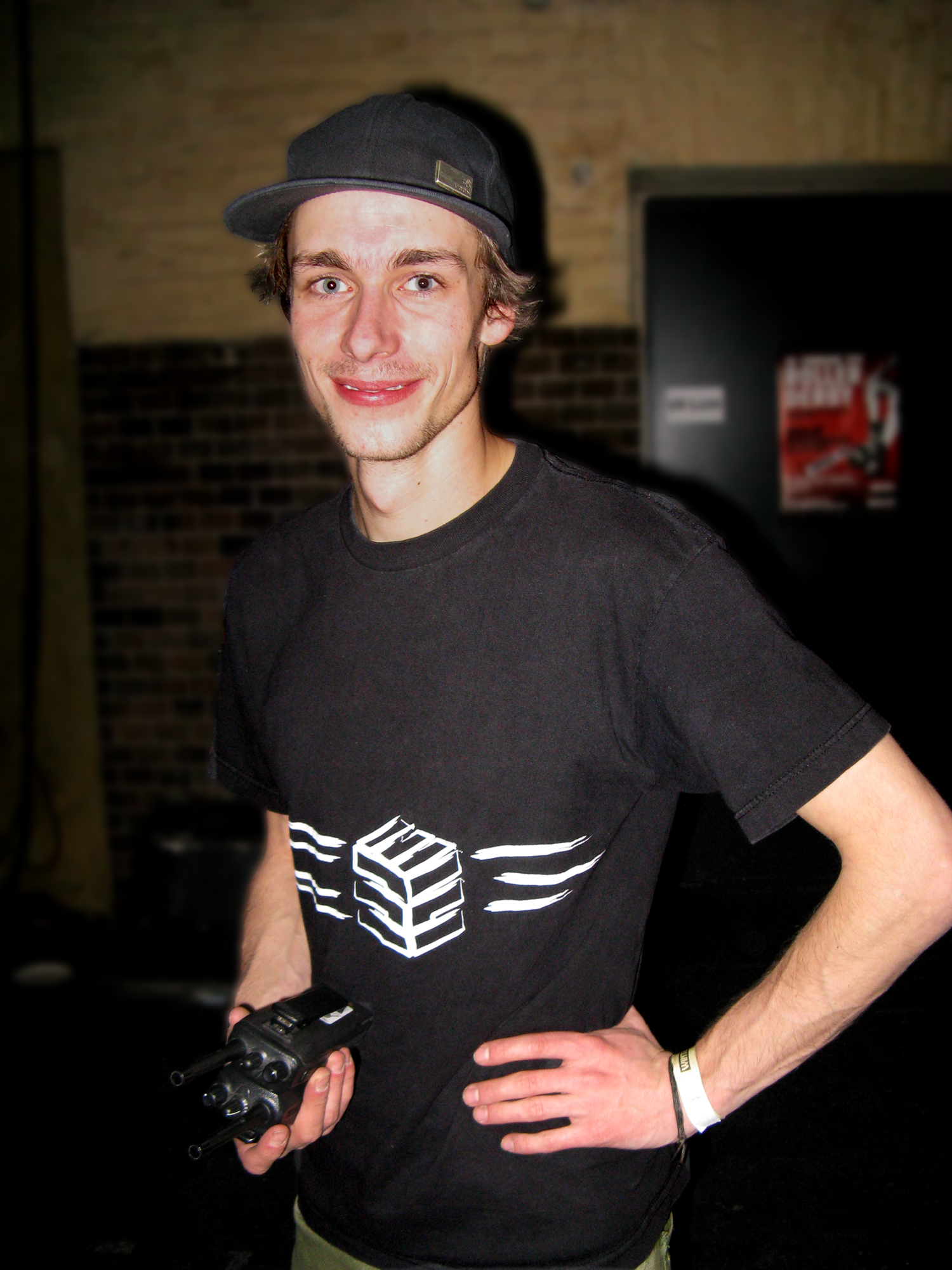 Johannes Jacobi auf dem Winterclash 2010 in arena Berlin